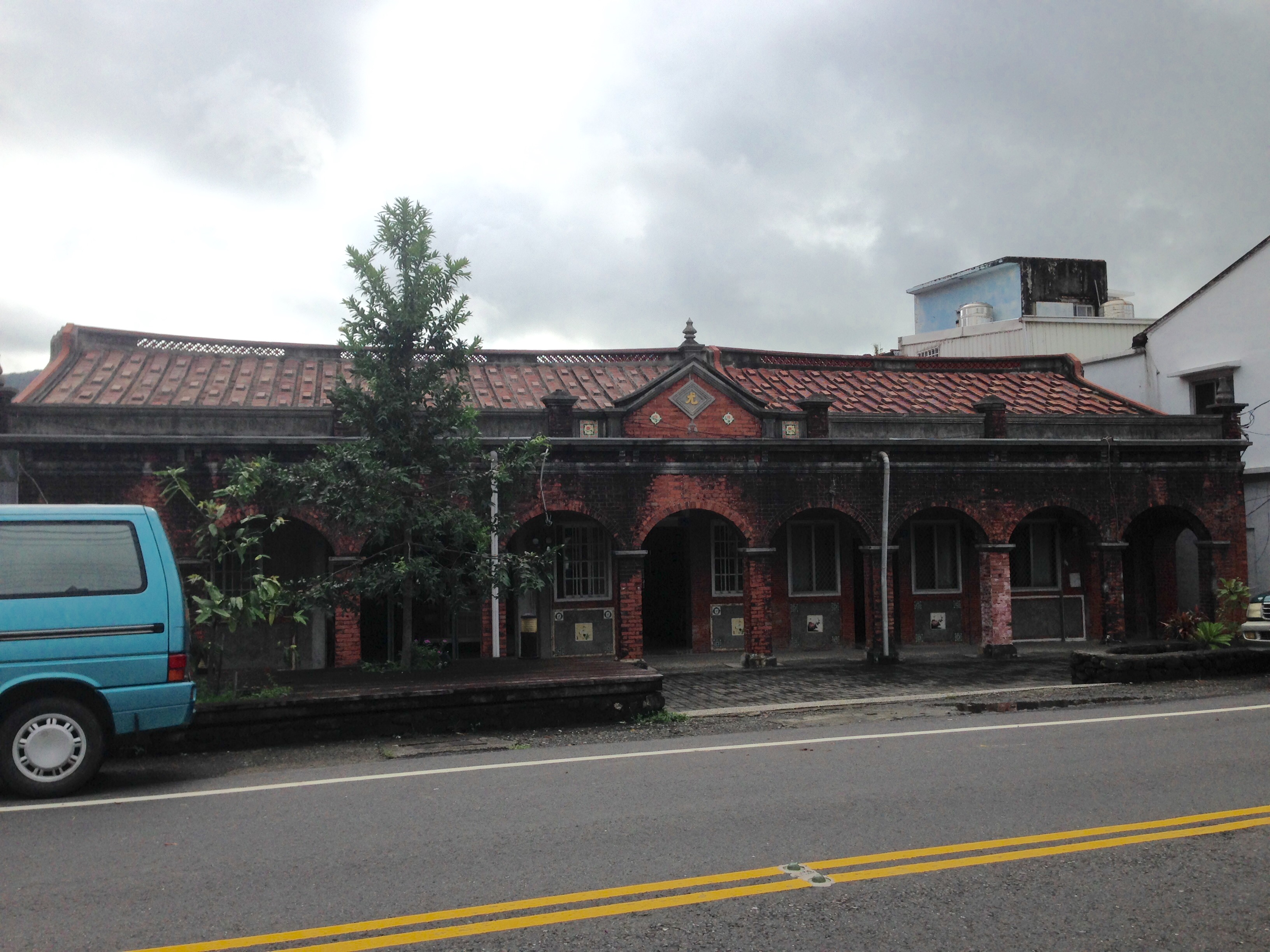 中文（台灣）: 滿州村尤宅古厝